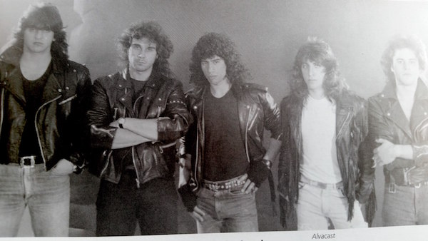 De izquierda a derecha: Jorge Villar (batería), Tycho Artigas (guitarra), Charly Lopez (voz), Leo Lamela (guitarra), Gustavo Rea (bajo)